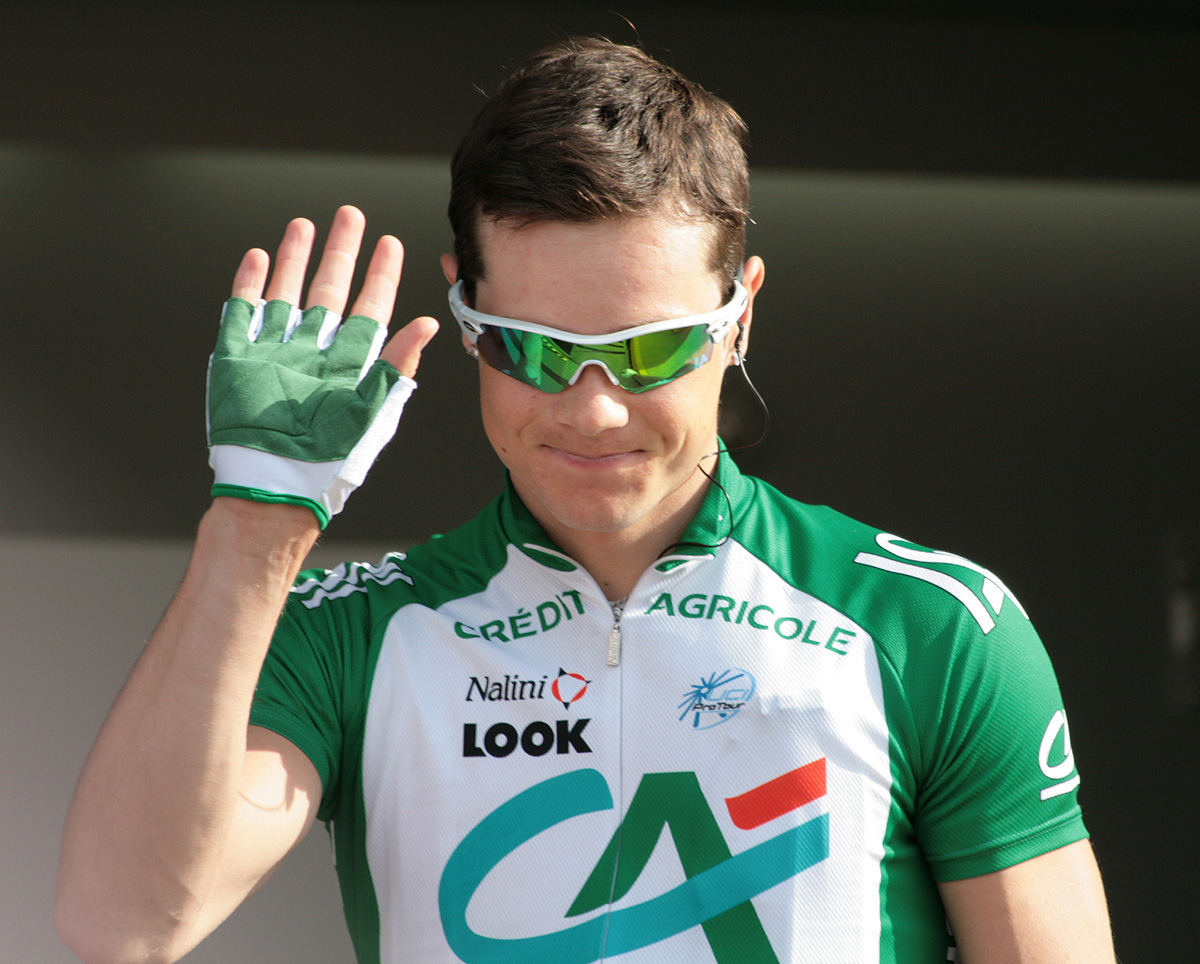 Nicholas Roche voor de start van Luik-Bastenaken-Luik 2008